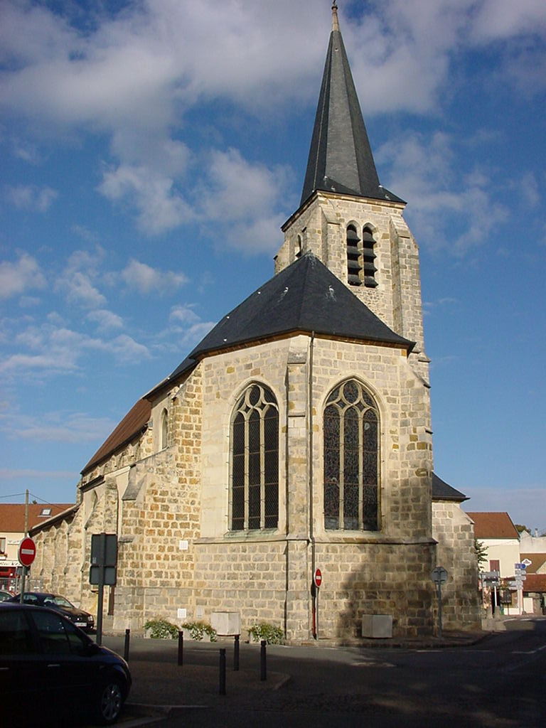 Guyancourt Eglise Saint Victor